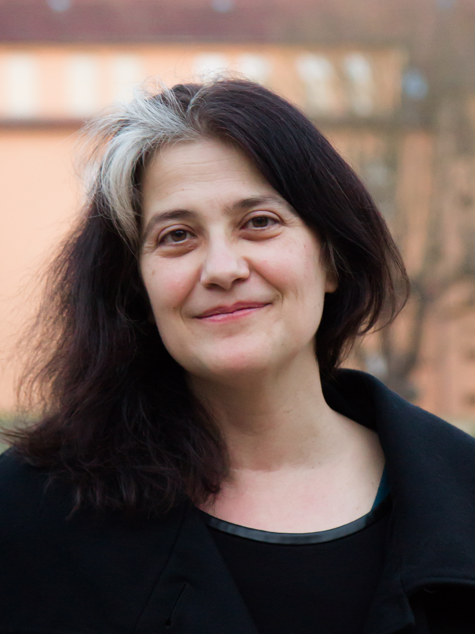 Die Schriftstellerin Rosa Ribas in Offenburg anlässlich der Offenburger Literaturtage 2014